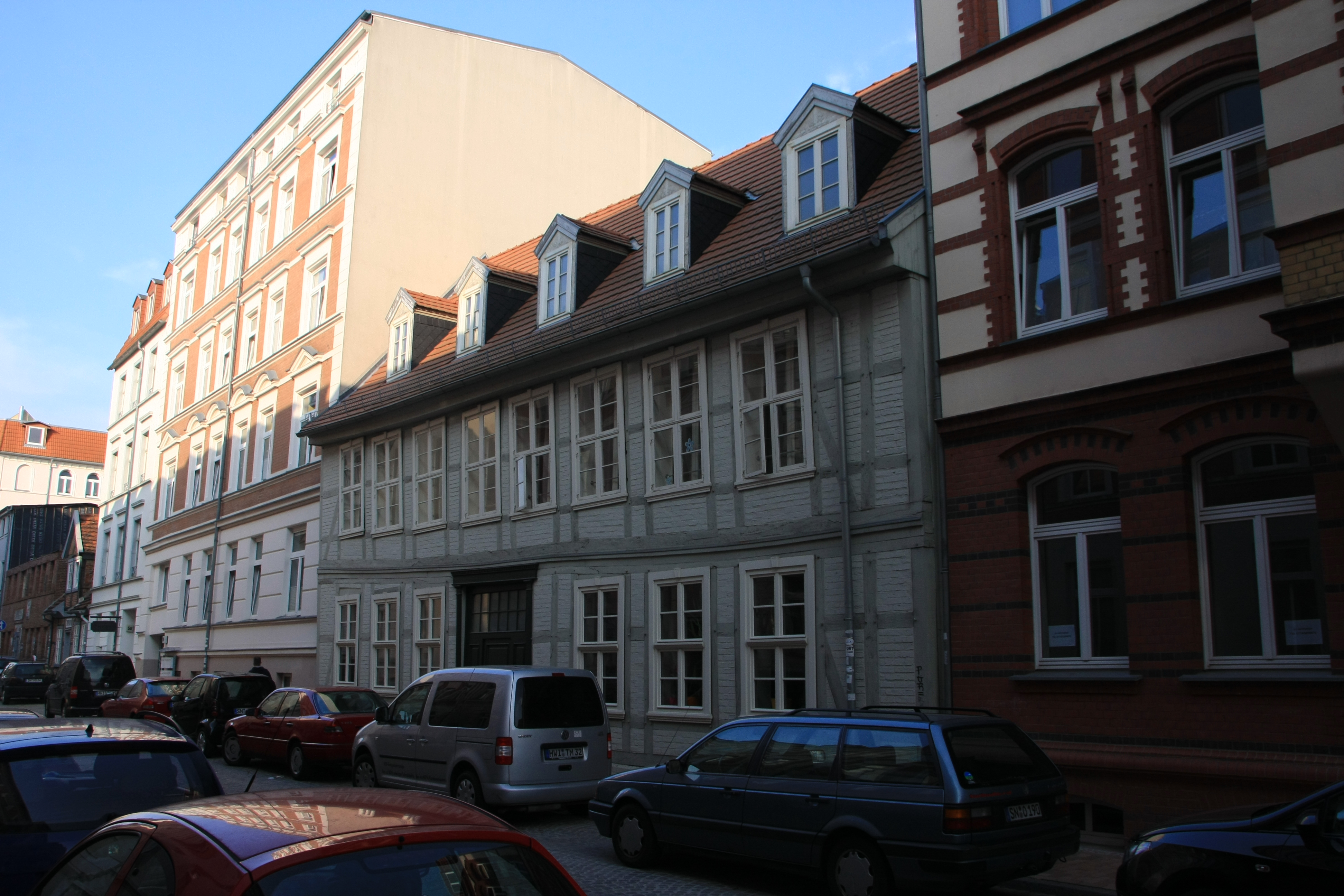 19055 Schwerin, Bergstraße 60